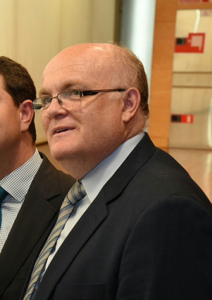 Pedro Antonio Ruiz Santos, delegado de la Junta en Albacete